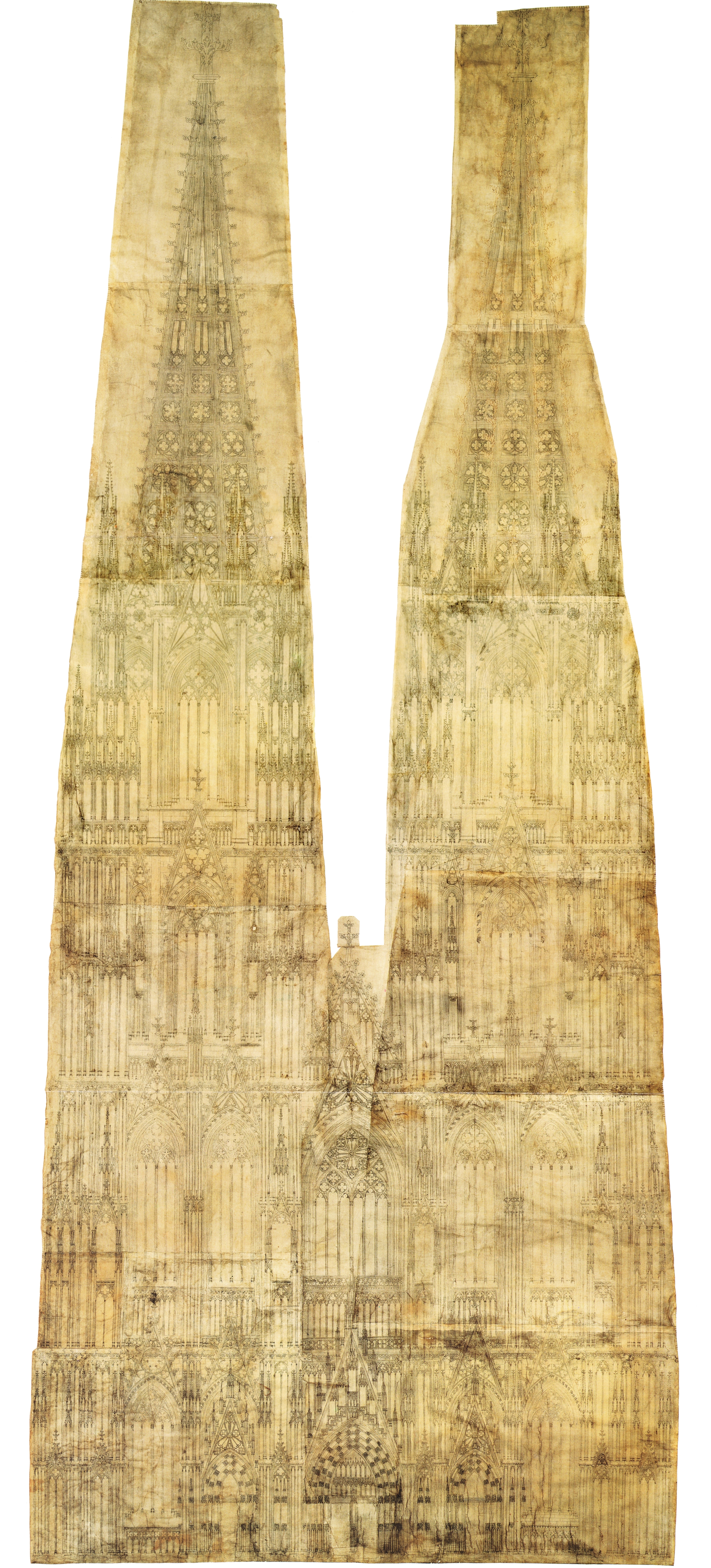 Fassadenplan F der Westfassade vom Kölner Dom